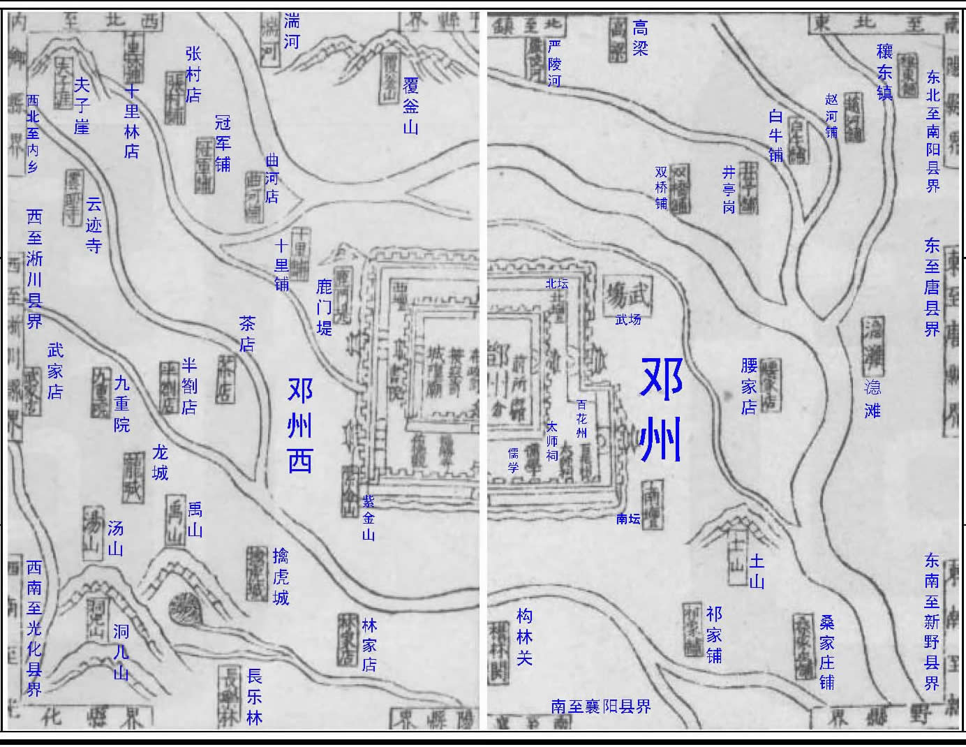 dengzhou in 1700